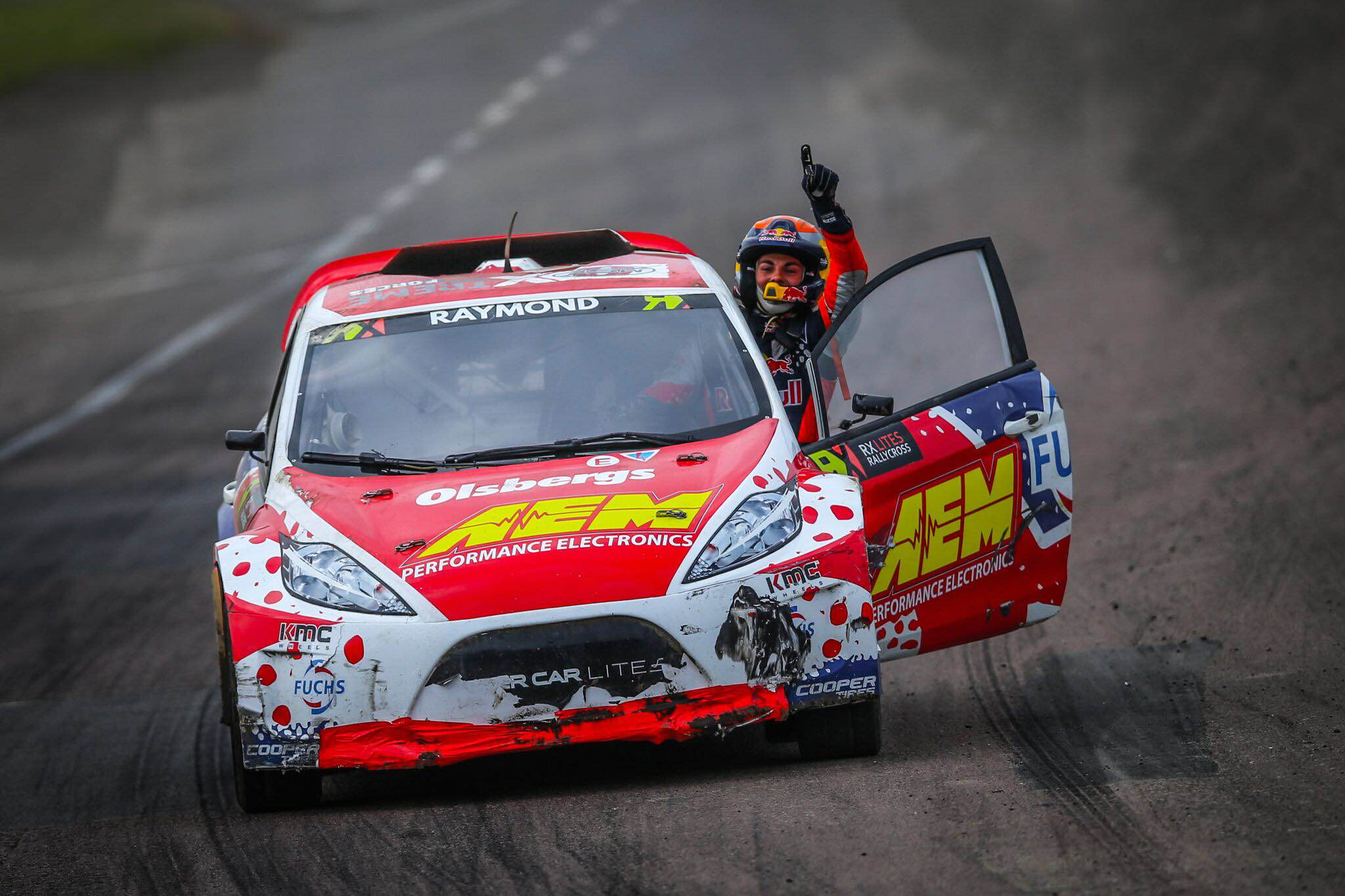 Photographie de Cyril Raymond et sa Ford Fiesta en championnat du monde de rallycross FIA en 2016 (catégorie RX Lites).